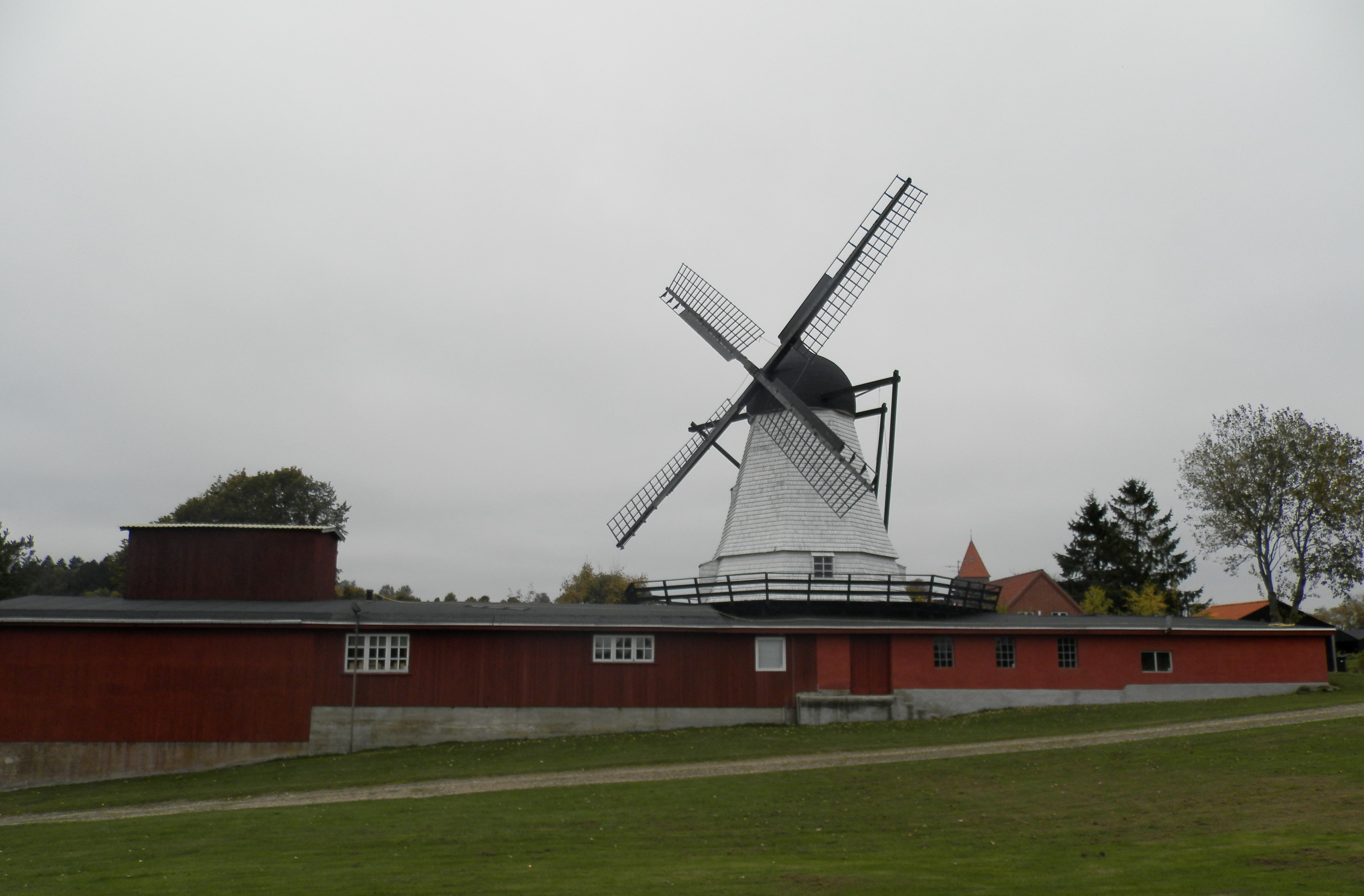 Gl. Rye Mølle,fotograferet okt. 2013